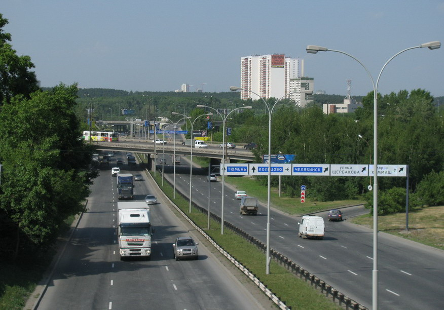 участок объездной дороги.